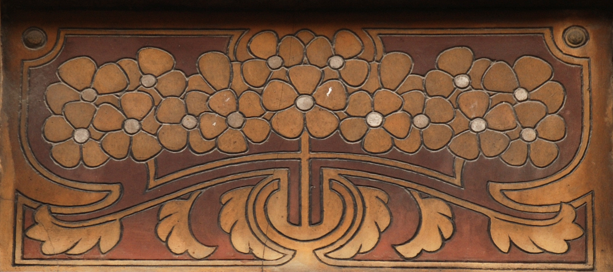 Belgique - Jambes - Charles Trussart - Rue Prinz 17 - Façade - Art nouveau